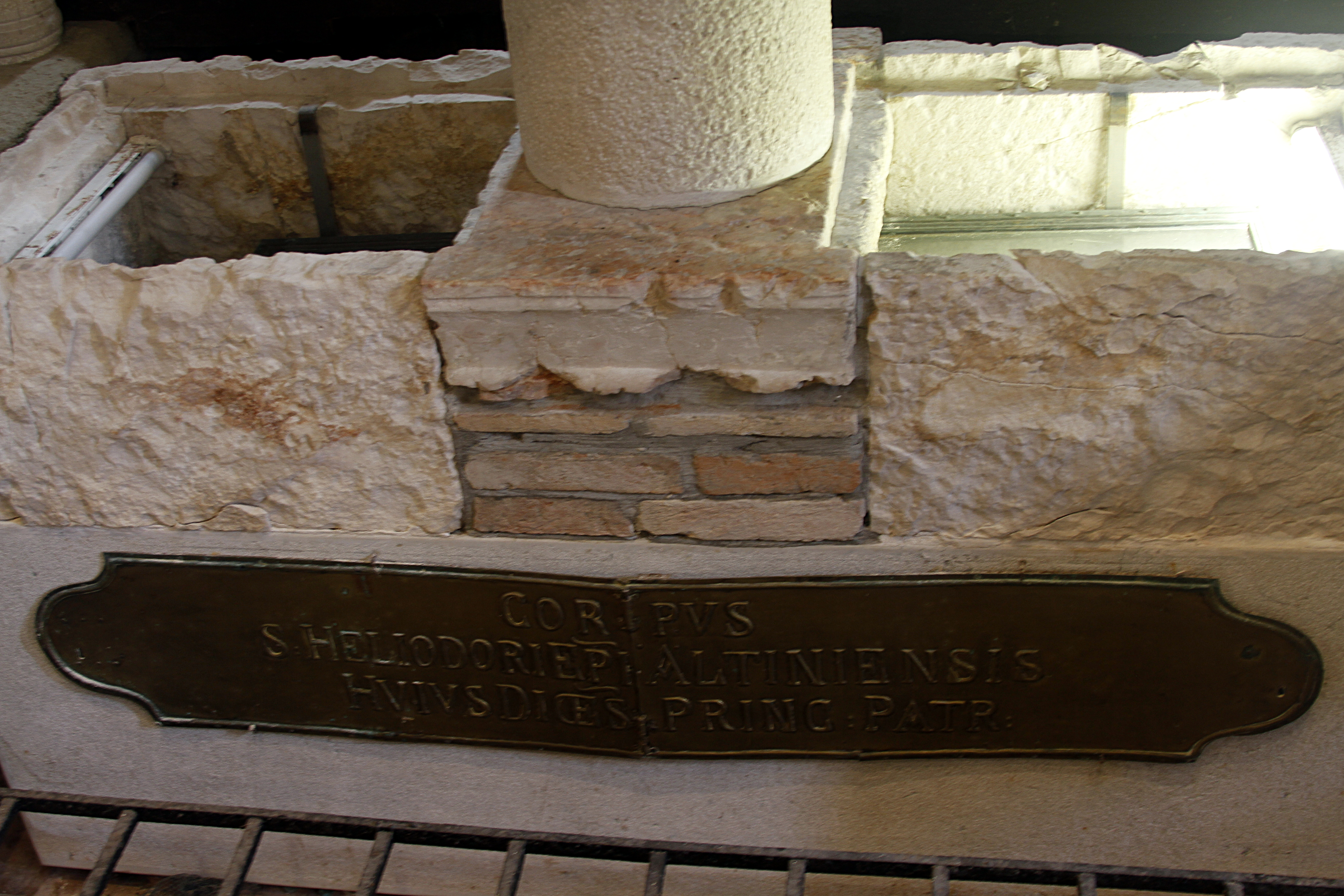 Santa Maria Assunta (Torcello) - Venice